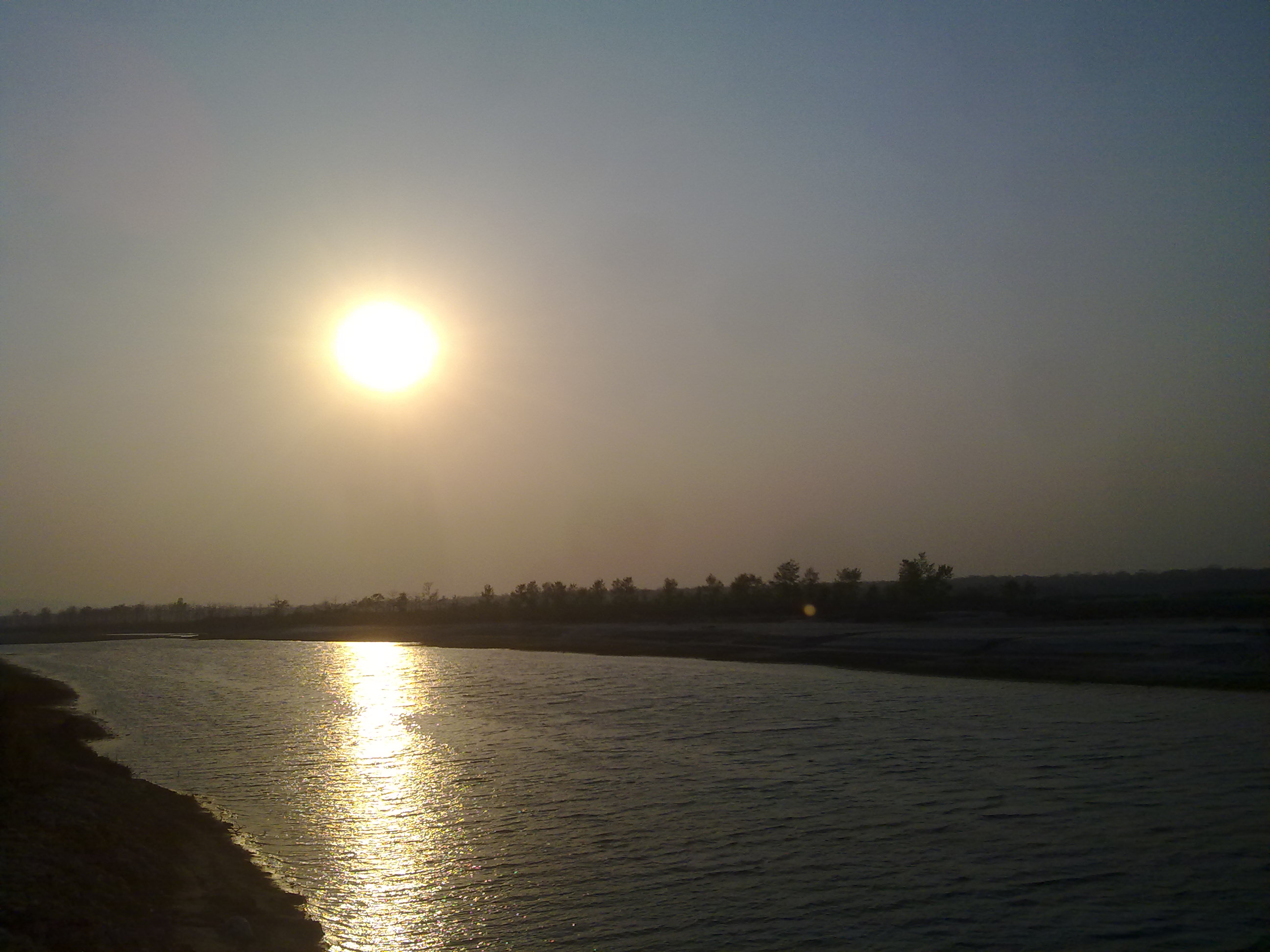 Sunset @ golaghat.